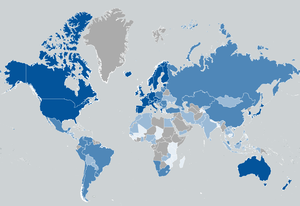 Երկրները՝ 2015-2016թթ. Մրցունակության համաշխարհային զեկույցի տվյալներով: Առավել մրցունակ երկրները ներկայացված են մուգ կապույտ գույնով: Երանգի թուլացմանը զուգընթաց նվազում է նաև երկրների մրցունակությունը: Մոխրագույնով նշված երկրները զեկույցում ներկայացված չեն